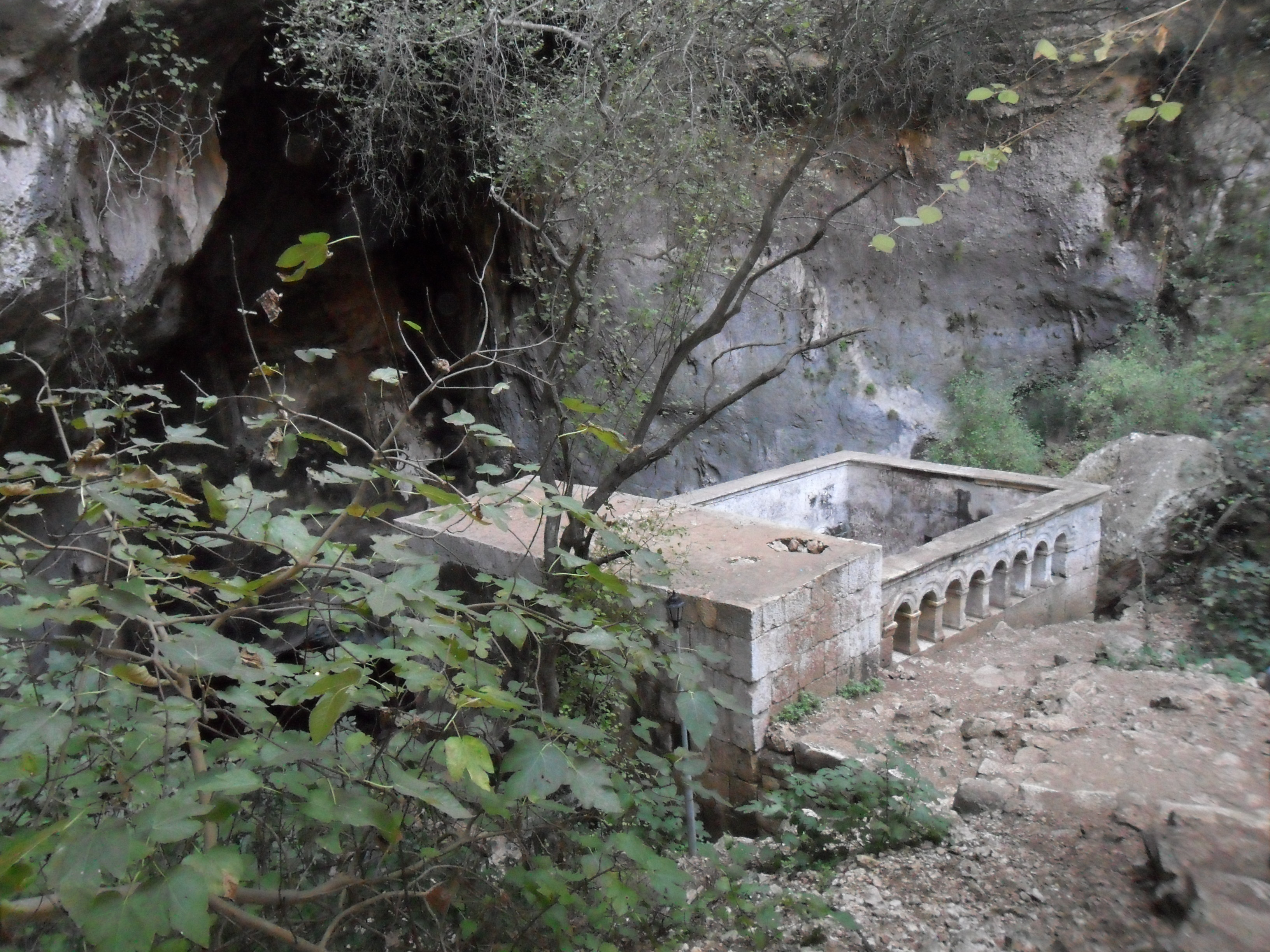 Cennet Çöküğü'nün girişinde yer alan Meryem Ana Kilisesi.